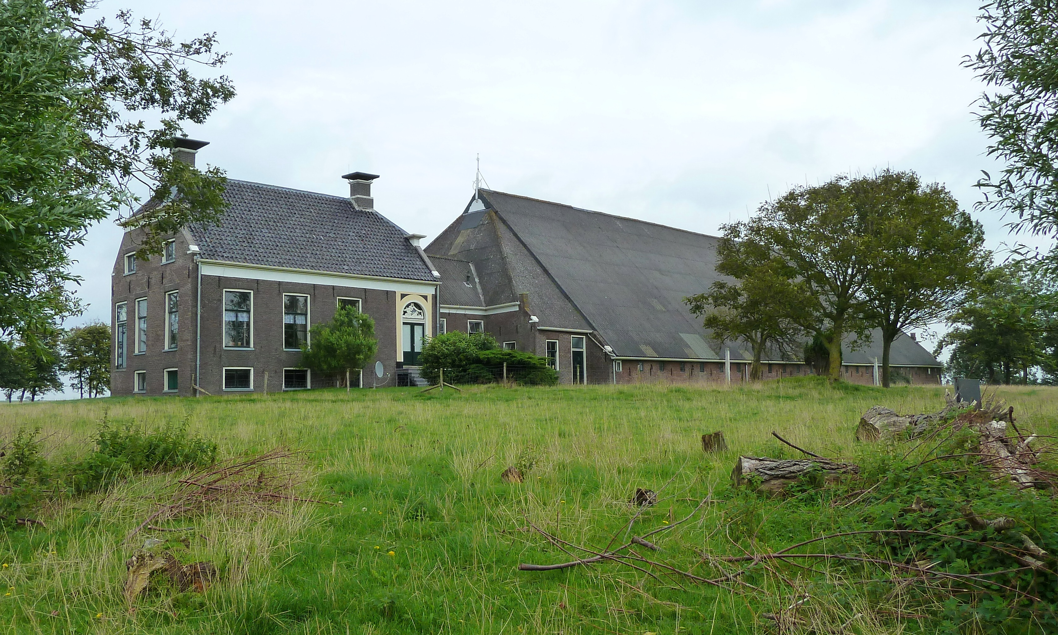 Boerderij Arion aan de M.D. Teenstraweg 2 (ten noorden van Den Andel, Winsum, Groningen, Nederland) schuin van voren gezien.